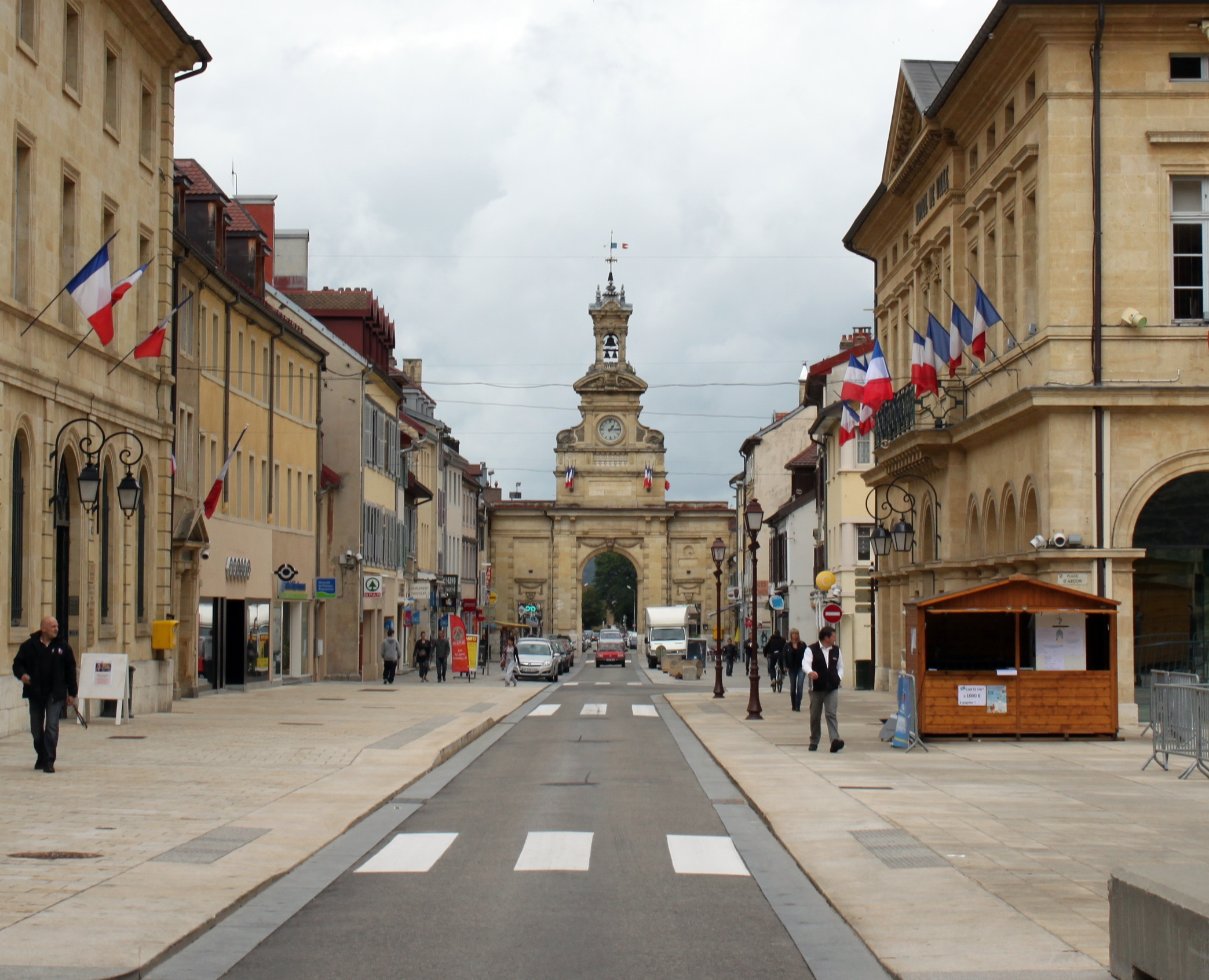 Porte Saint-Pierre, Pontarlier, Doubs, Franche-Comté, France